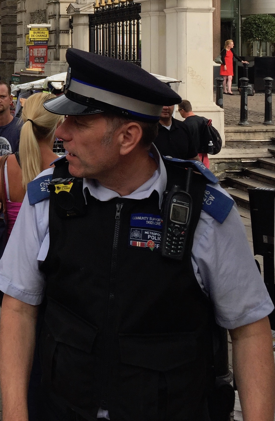 Politieman in Londen met een bodycam, gemaakt in Londen in 2017 op straat